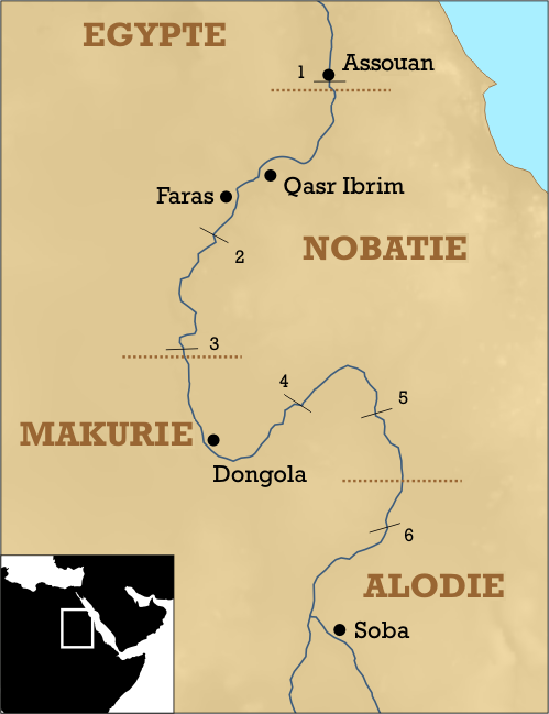 Carte de la Nubie chrétienne